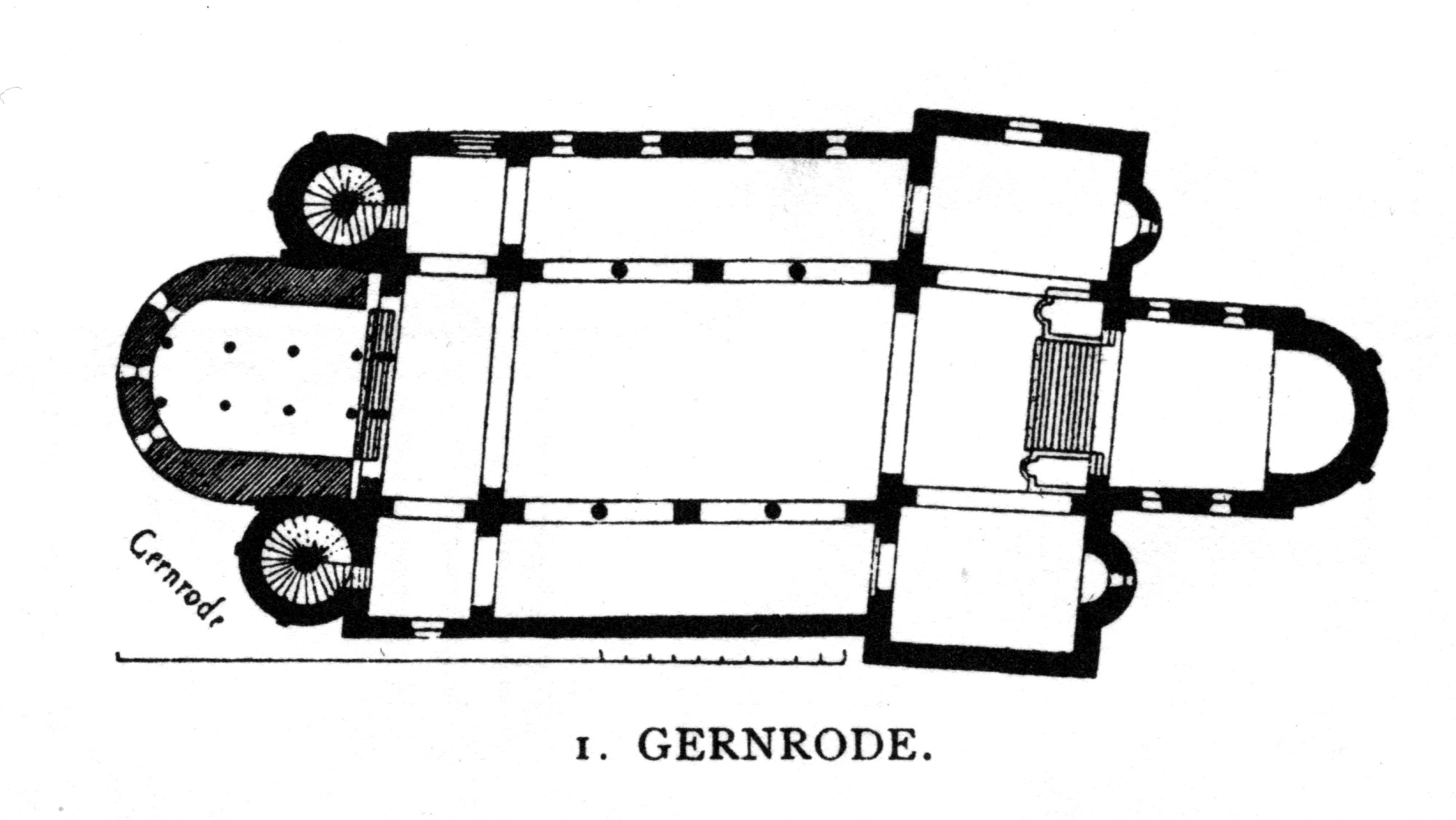 Gernrode, Stiftskirche St. Cyriakus. Floor plan.